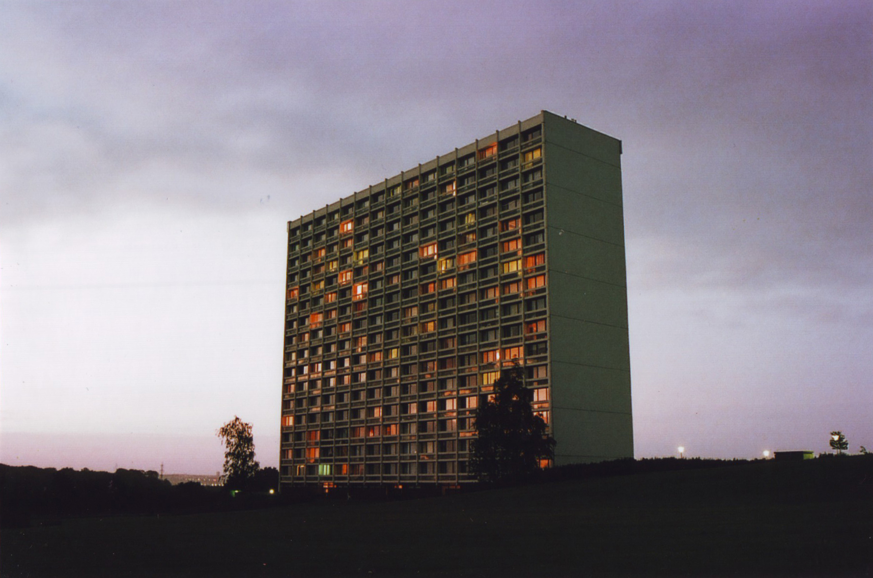 Grøfthøjparken 159-163.